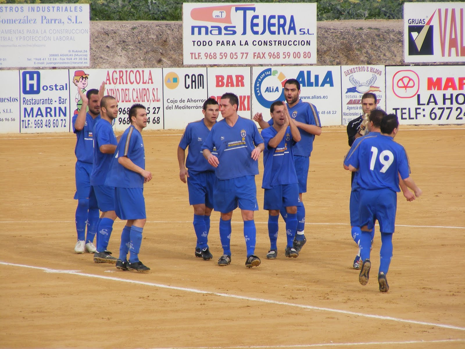 La Hoya Deportiva temporada 2009/10. Gracias a frenteconservero.